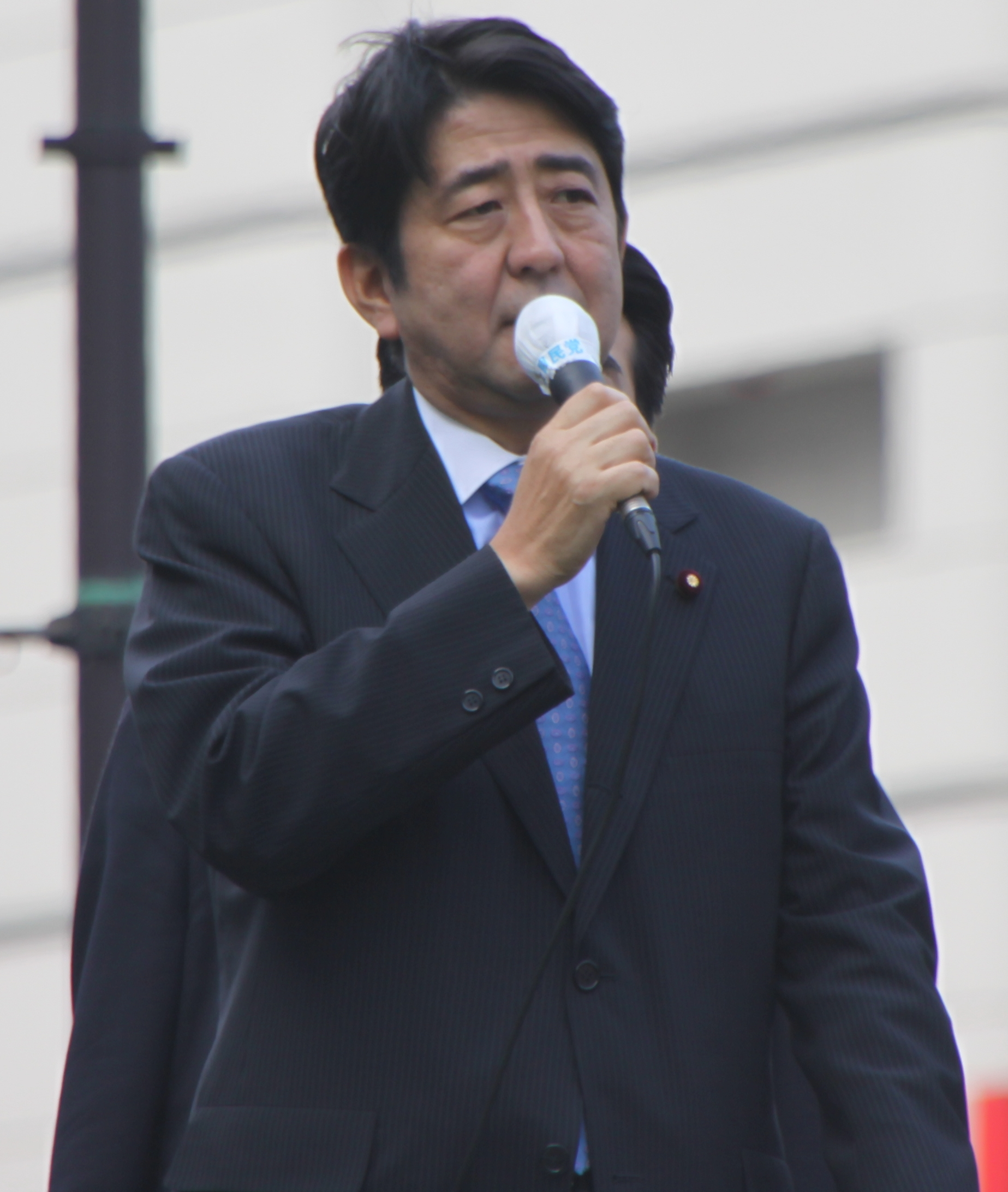 安倍晋三、創生「日本」による池袋駅での演説